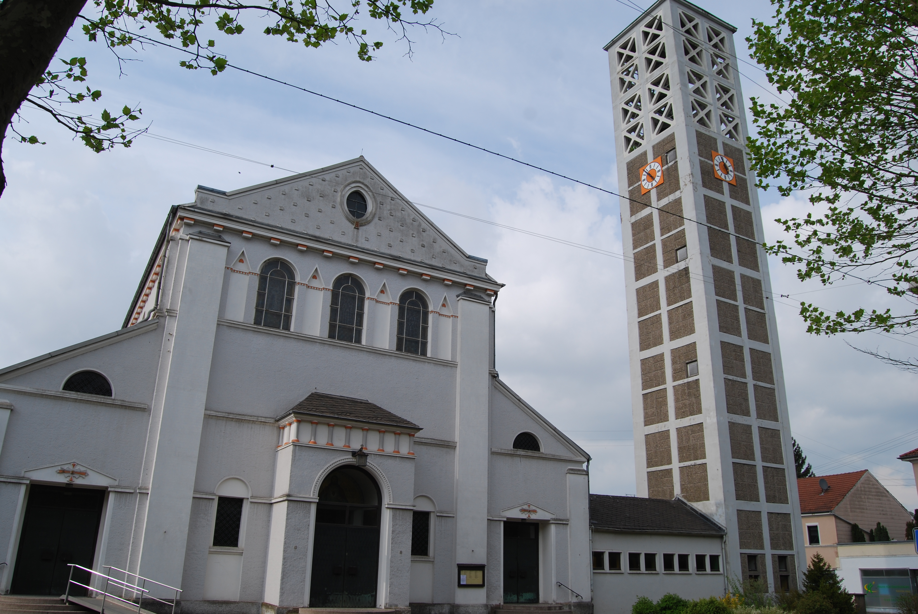 Herz Jesu Kirche mit denkmalgeschütztem Kirchturm